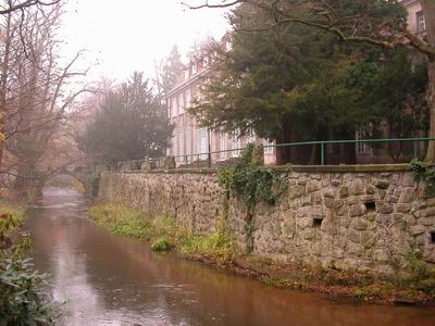 Iłowa, renesansowy pałac nad Czerną Małą